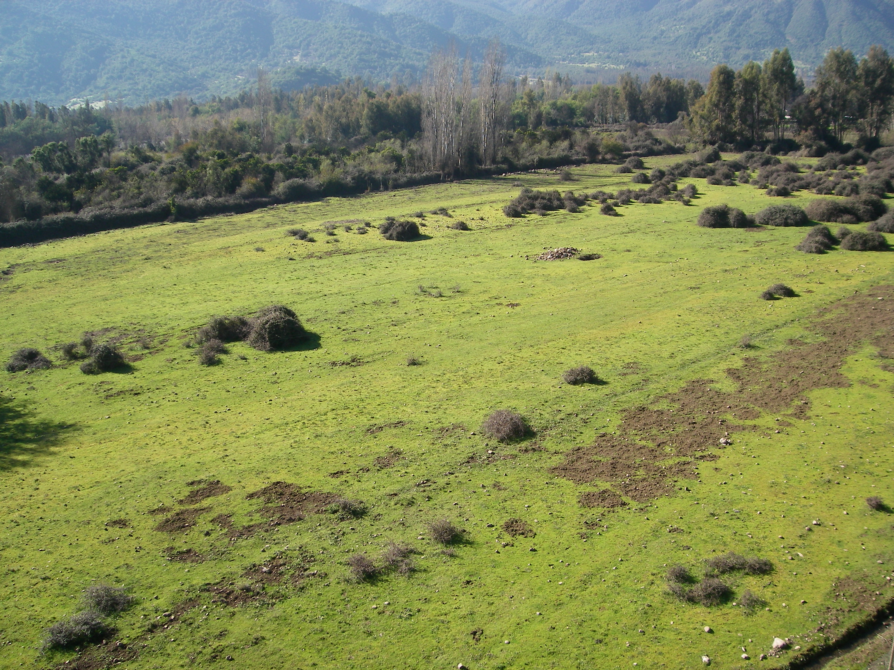 Popeta.